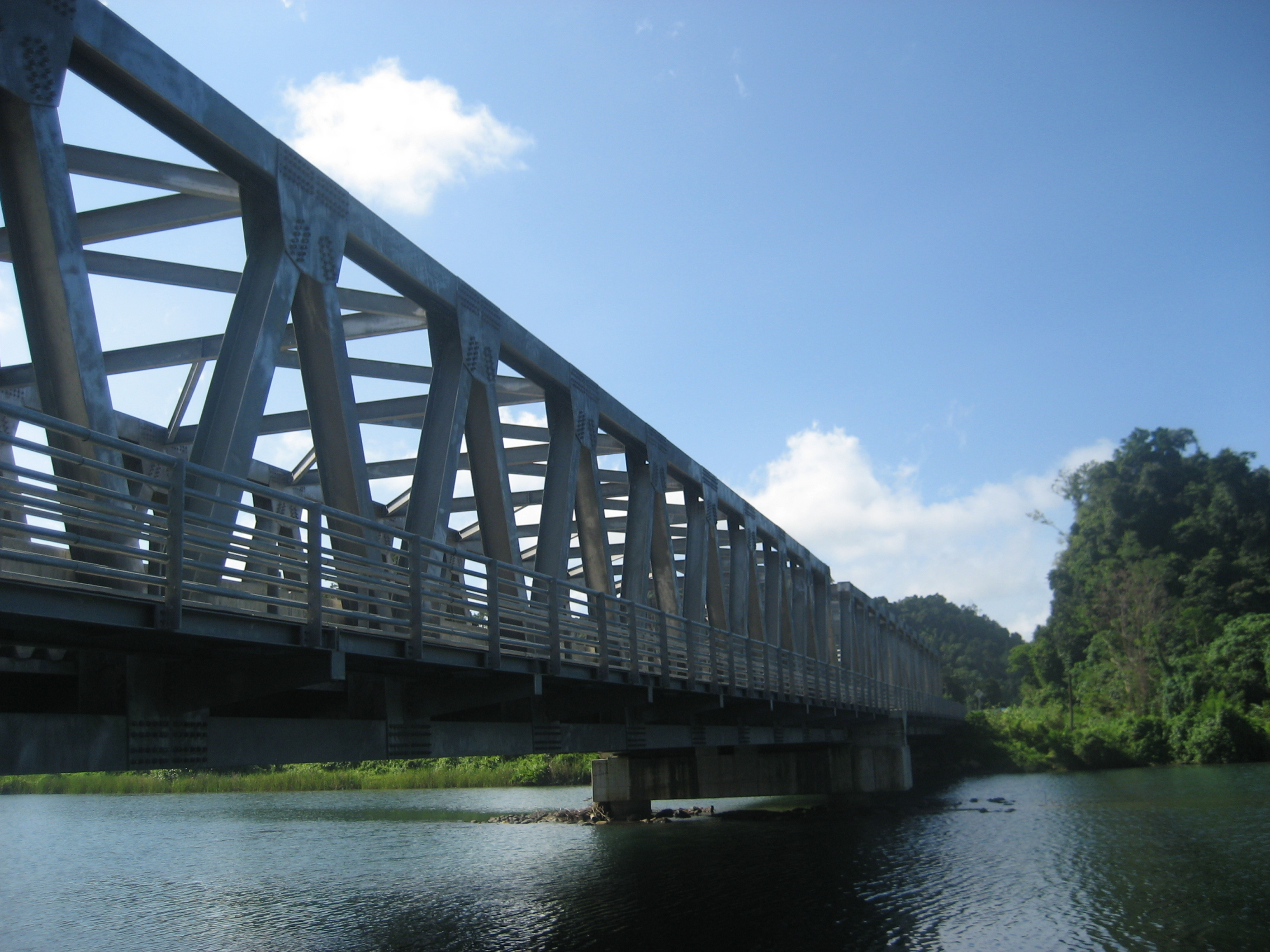 Jembatan Dutch berlokasi di Leupung didirikan dengan bantuan dana USAID.